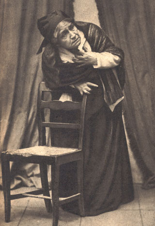 Italian actress Giacinta Pezzana in Zola's Teresa Raquin, at the Teatro dei Fiorentini in 1879